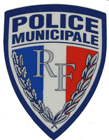 Insigne Police municipale